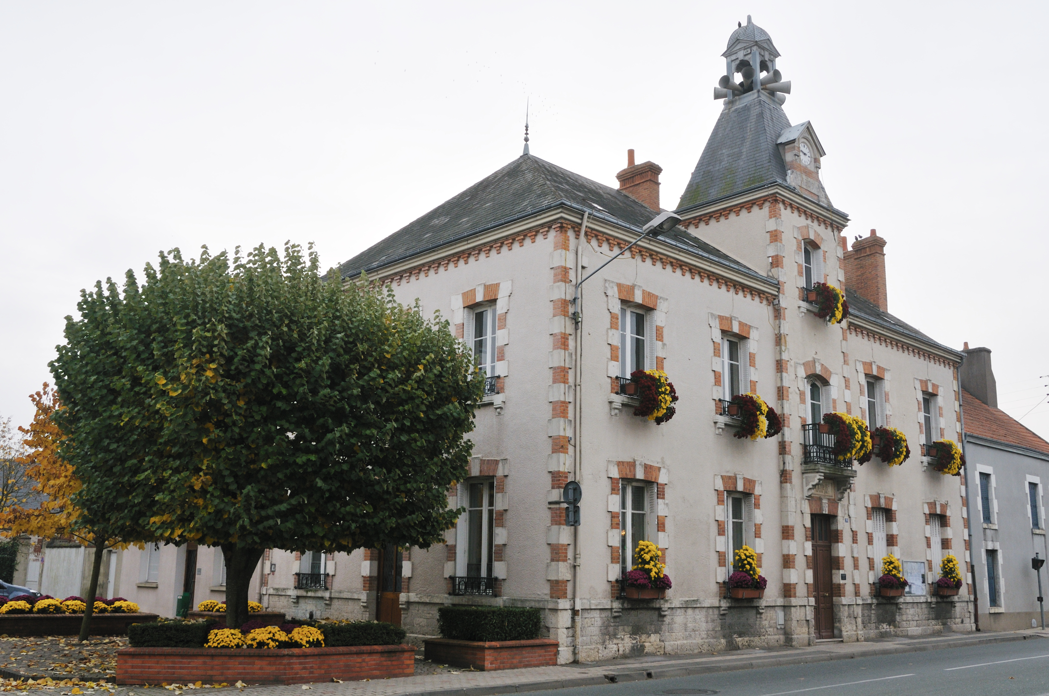 Mairie de Chevilly, Loiret, France